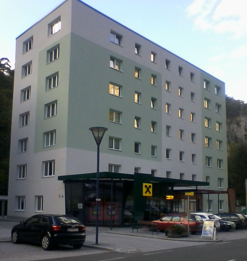 Schottwien/Österreich: Das 1962 erbaute Gemeinde- und Wohnhaus.